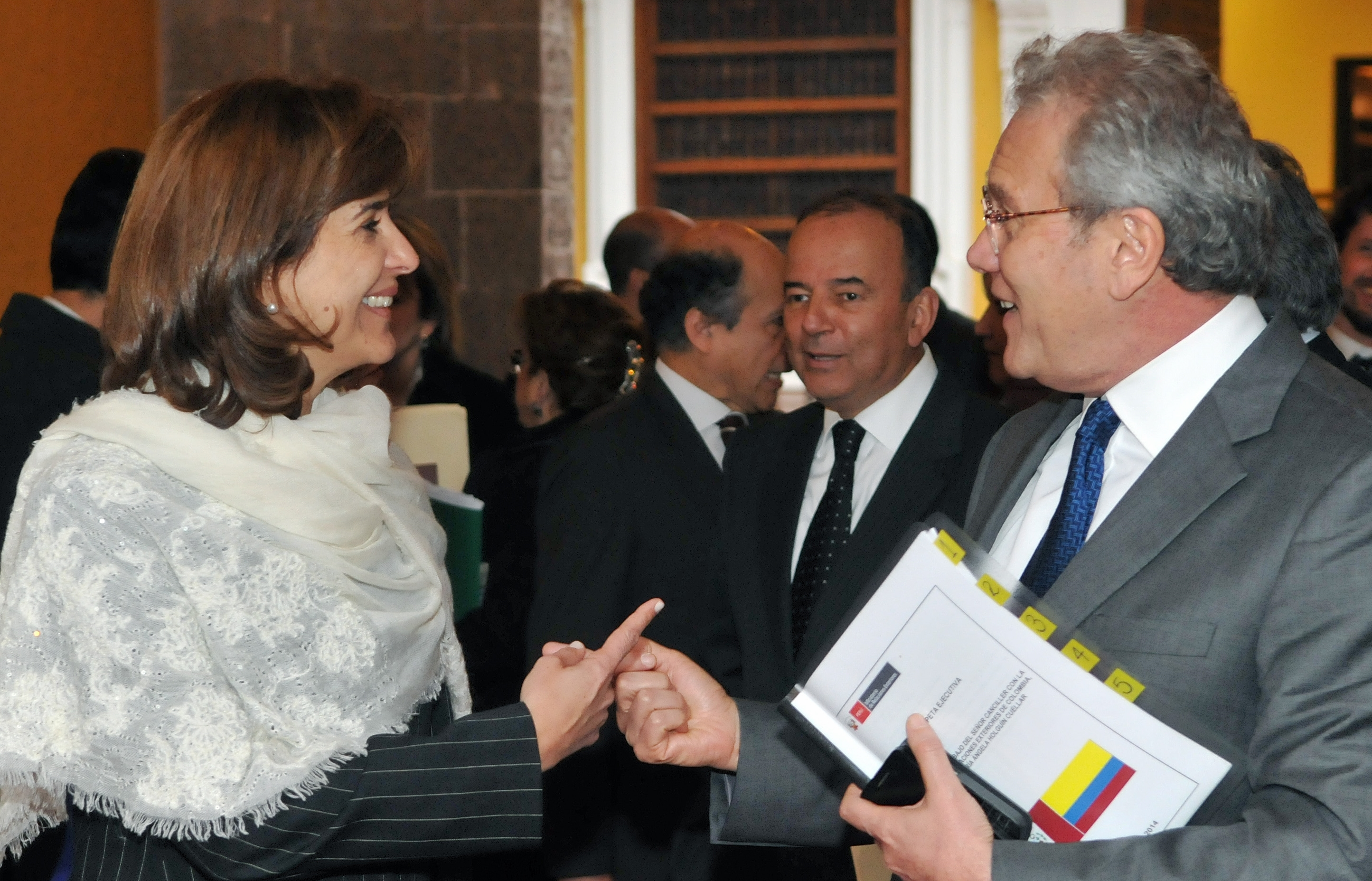 El Ministro de Relaciones Exteriores, Embajador Gonzalo Gutiérrez Reinel, sostuvo una reunión de trabajo con su homóloga de Colombia, María Ángela Holguín, a fin de preparar el Encuentro Presidencial y Primer Gabinete Binacional Perú - Colombia, que se llevará a cabo el próximo 30 de septiembre en la ciudad de Iquitos. Los Gabinetes Binacionales permitirán reforzar la cooperación bilateral e identificar políticas sectoriales y proyectos conjuntos en beneficio de las poblaciones de ambos países, en particular de las que habitan en las zonas fronterizas. El Primer Gabinete se desarrollará en torno a los ejes de Asuntos Sociales y de Desarrollo, Oportunidades Comerciales, Seguridad y Defensa, y Asuntos Fronterizos.